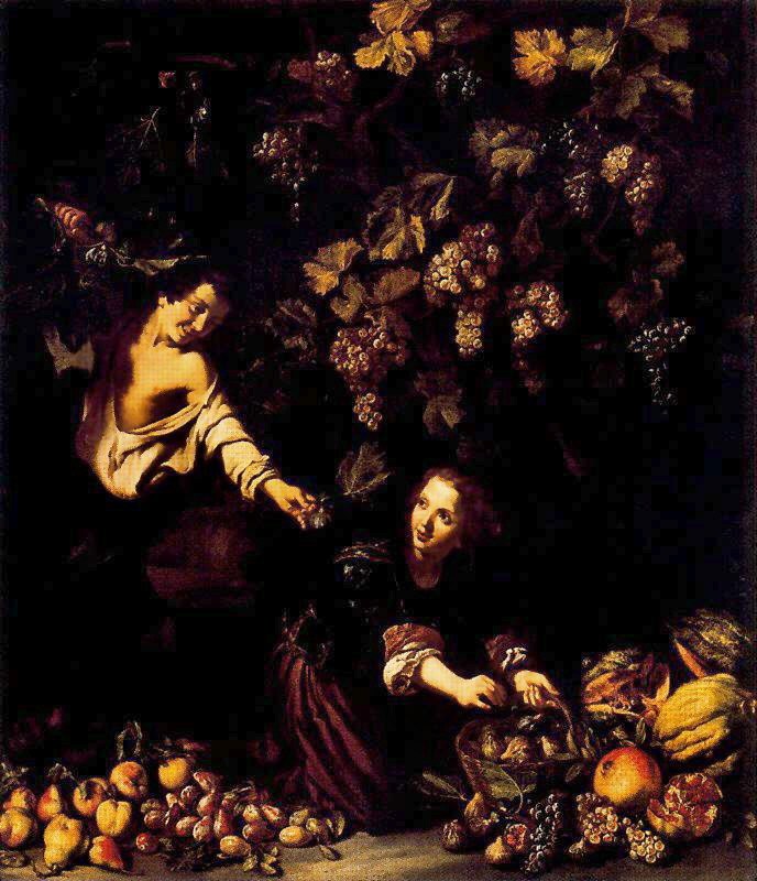 Niños cogiendo fruta, óleo sobre lienzo, 198 x 170 cm. Madrid, Museo del Prado.